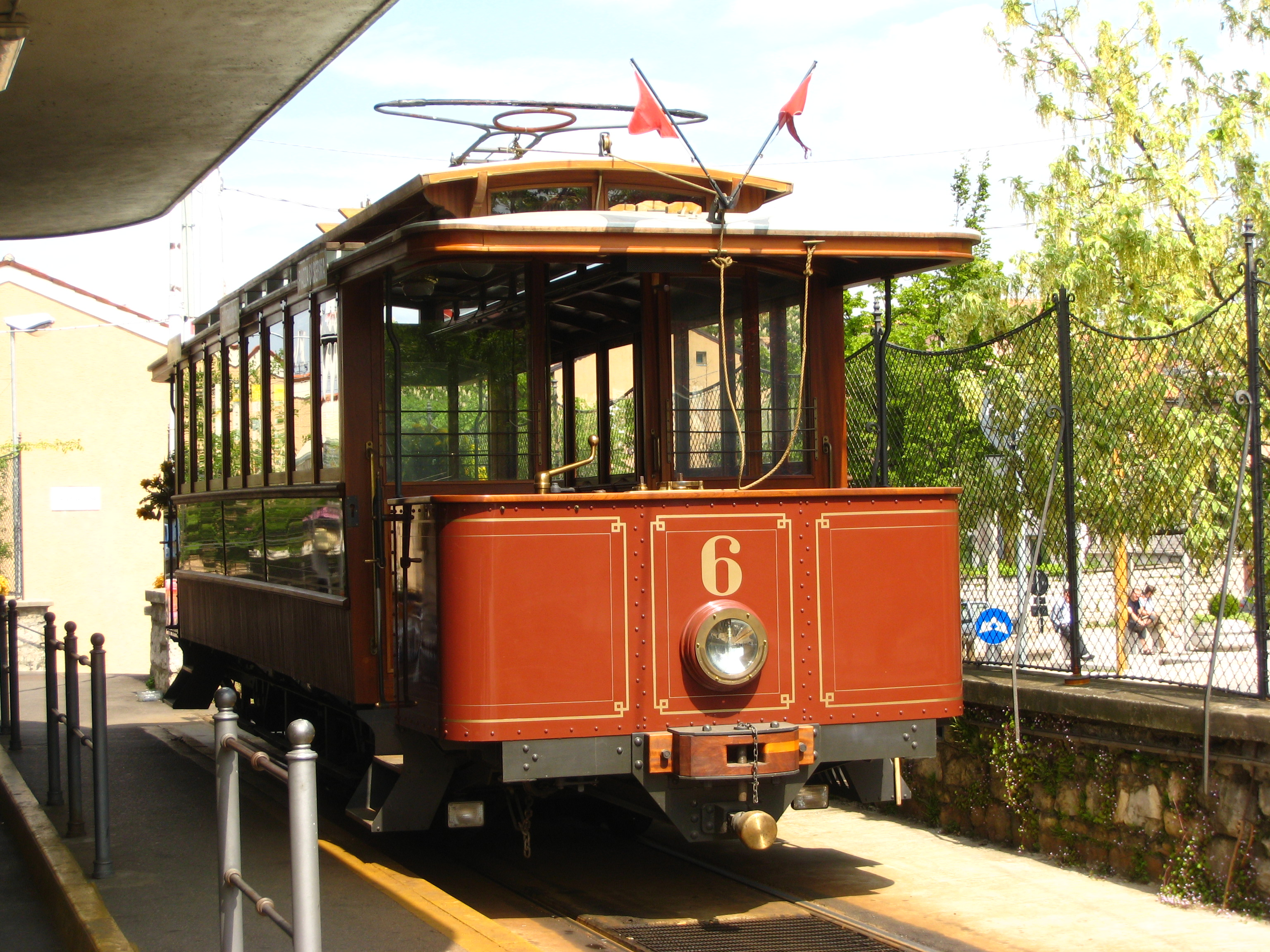 Vettura n. 6 della trenovia di Opicina, conservata al museo ferroviario Campo Marzio